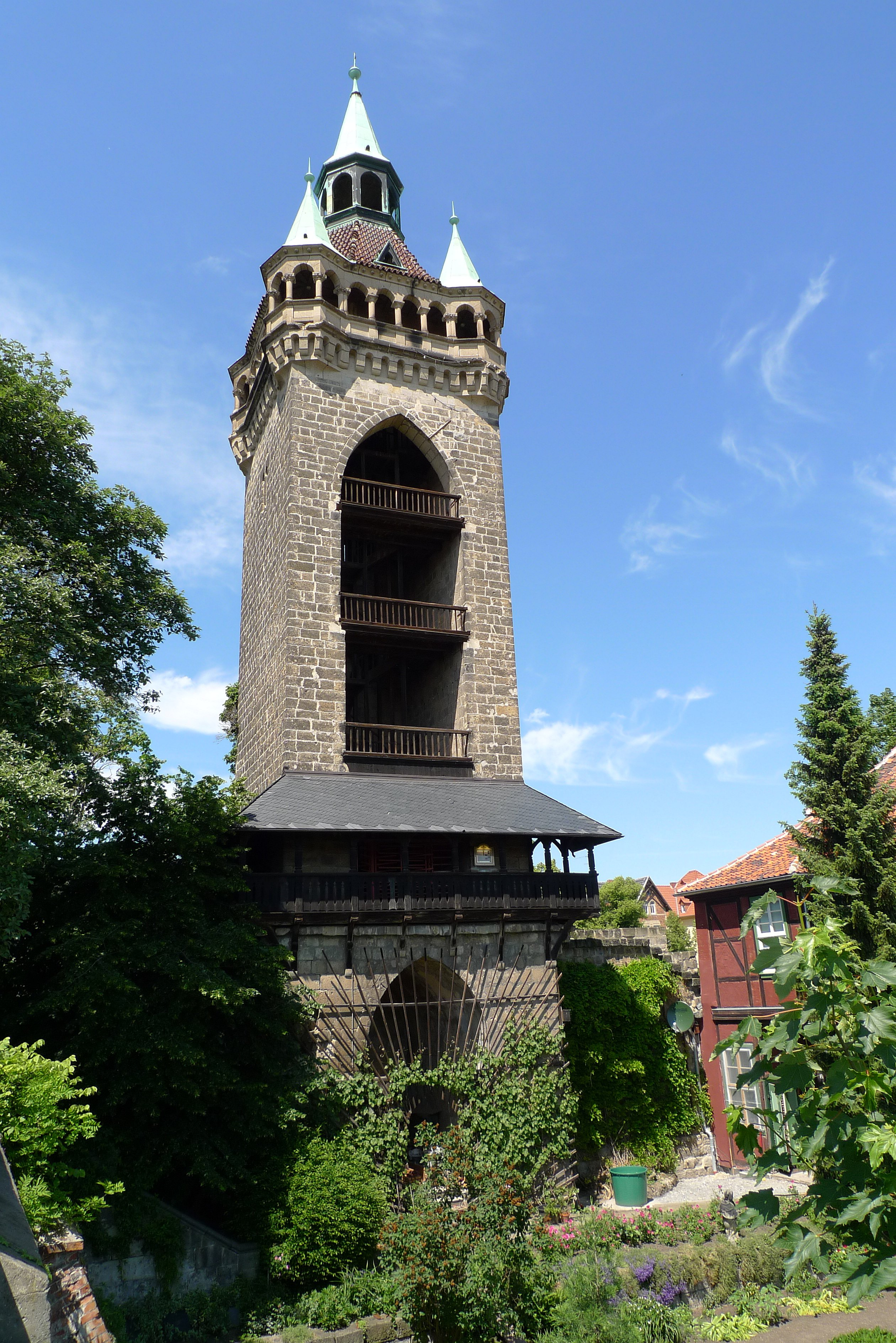 Der Sternkiekerturm in Quedlinburg